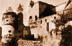 Streitwiesen 1972 (Original text : Jugenburg Streitwiesen, Quelle: Archiv Streitwiesen, Fotograf: unbekannt, Datum der Aufnahme: 1972;)